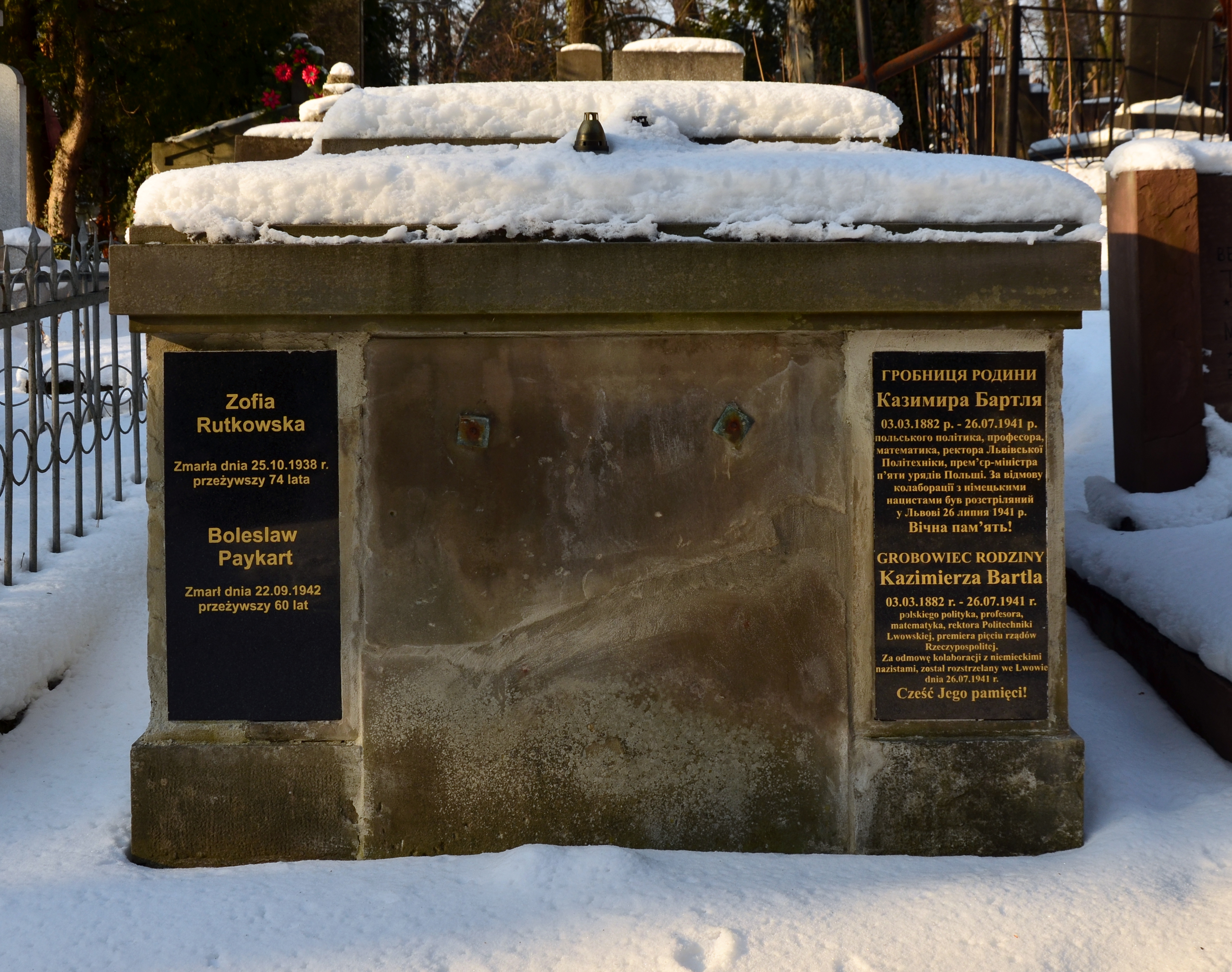 Гробівець Казимира Бартля на Личаківському цвинтарі у Львові.